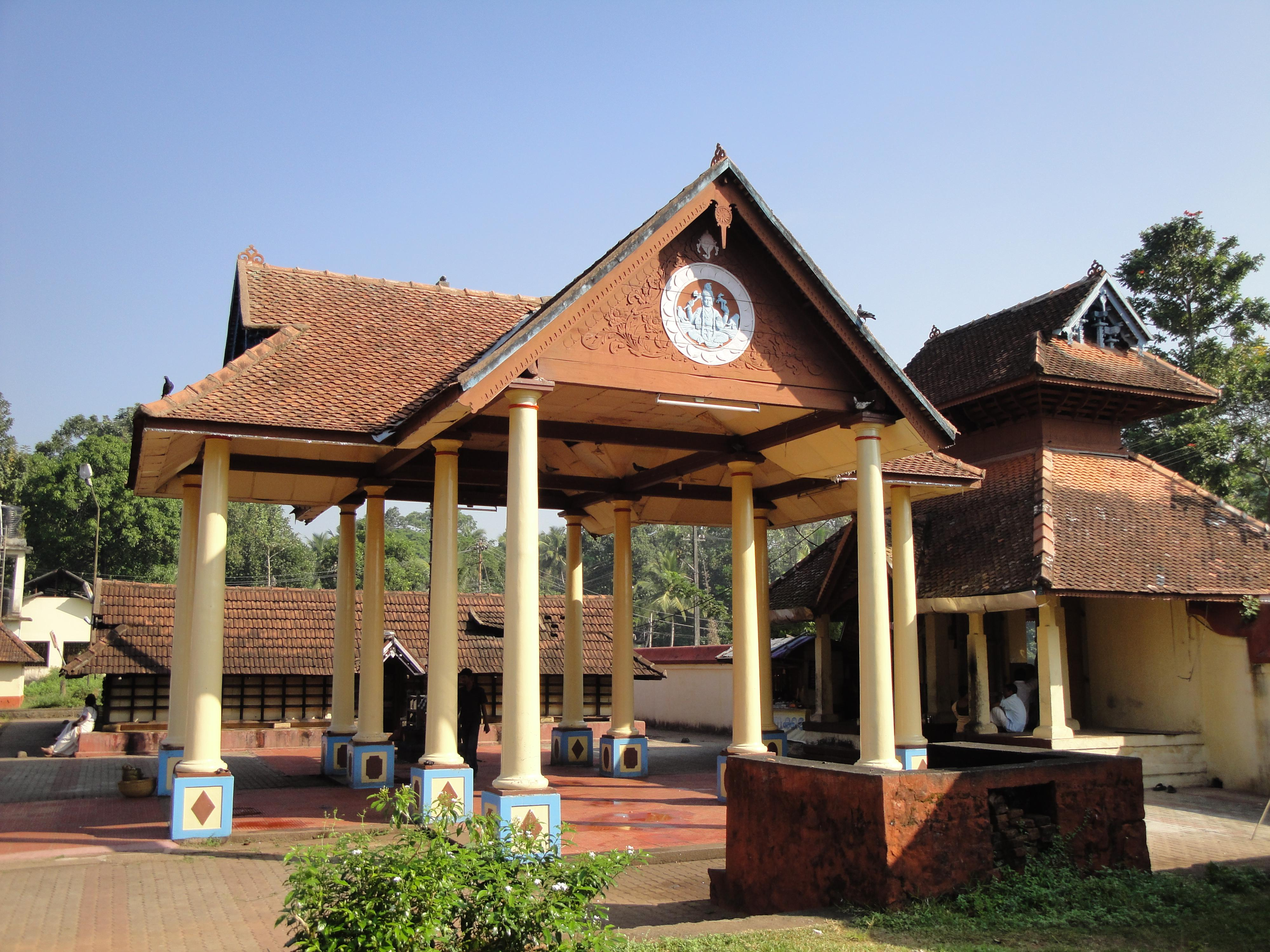 കിഴക്കേആനക്കൊട്ടിൽ